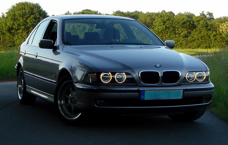 BMW 520i